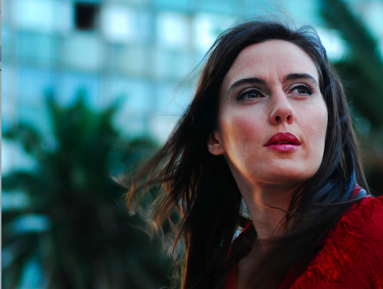 Fotografía de Malena Muyala